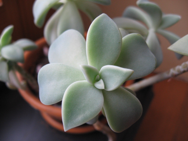 Sedum weinbergii